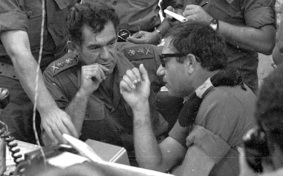 גורודיש ודוד אלעזר במלחמת יום הכיפורים